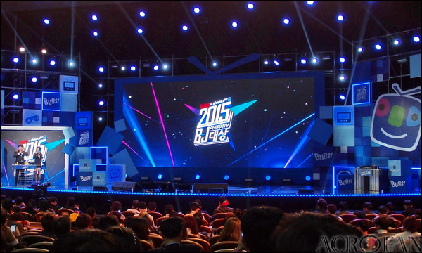 2015 아프리카TV BJ대상 시상식이 시작하는 모습 왼쪽 끝에는 2015년 '아프리카TV BJ대상'의 MC를 맡고 있는 최군과 박현서가 보인다.